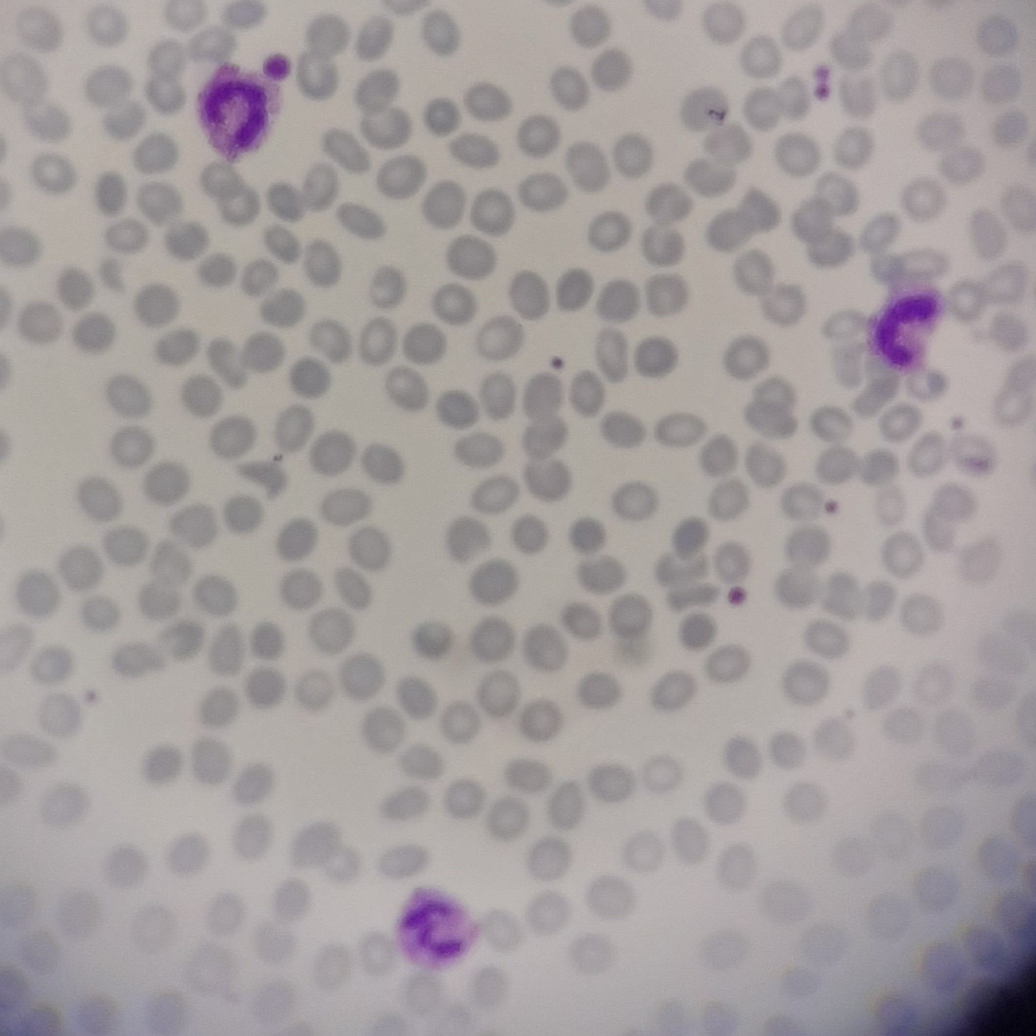 Campo visual con 2 neutrófilos cayados (células en la parte superior izquierda y superior derecha) y un segmentado (parte inferior centro, con borrosidad por efecto lente), a 400 aumentos. Tinción May-Grünwald-Giemsa modificada para urgencias. Paciente varón de 91 años con neumonía, mostrando hemograma con leucocitosis, neutrofilia y presencia de granulocitos inmaduros y granulación tóxica.